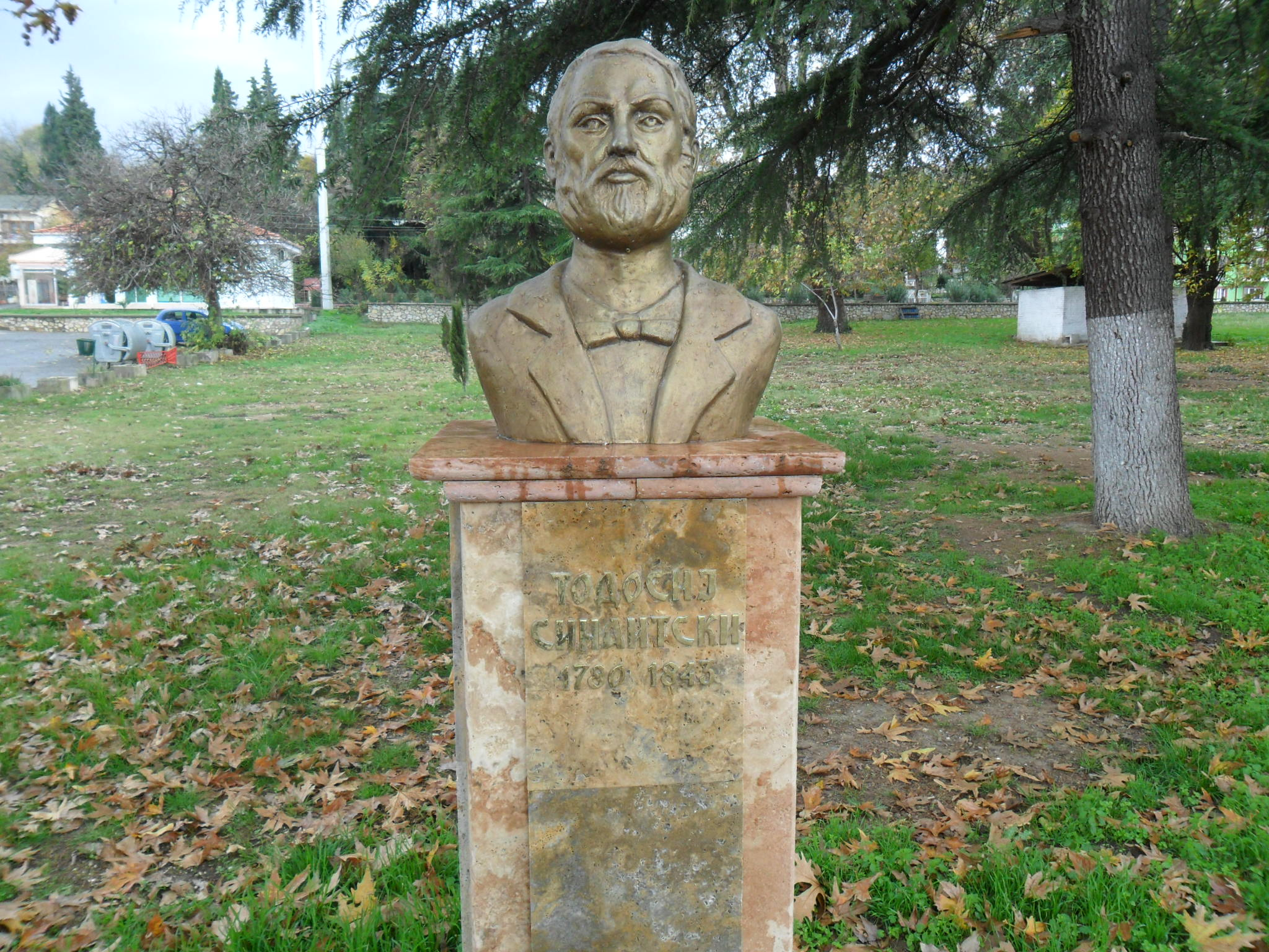 Бюст-паметник на Теодосий Синаитски